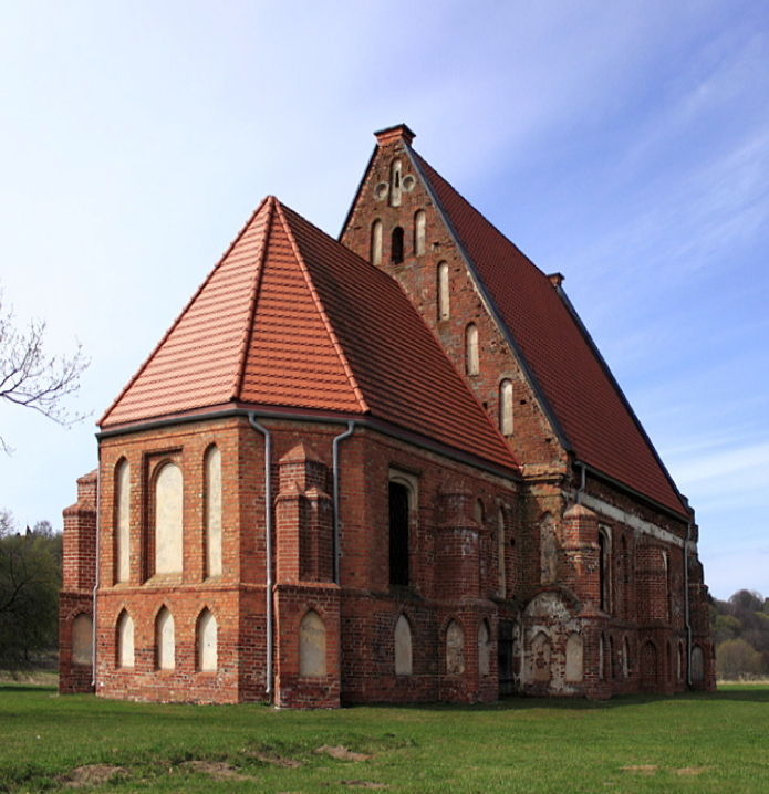 Senoji Zapyškio bažnyčia